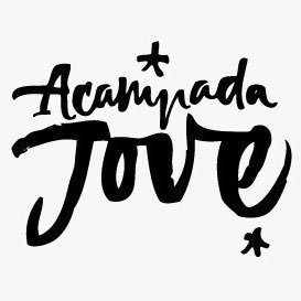 Logo de l'Acampada Jove